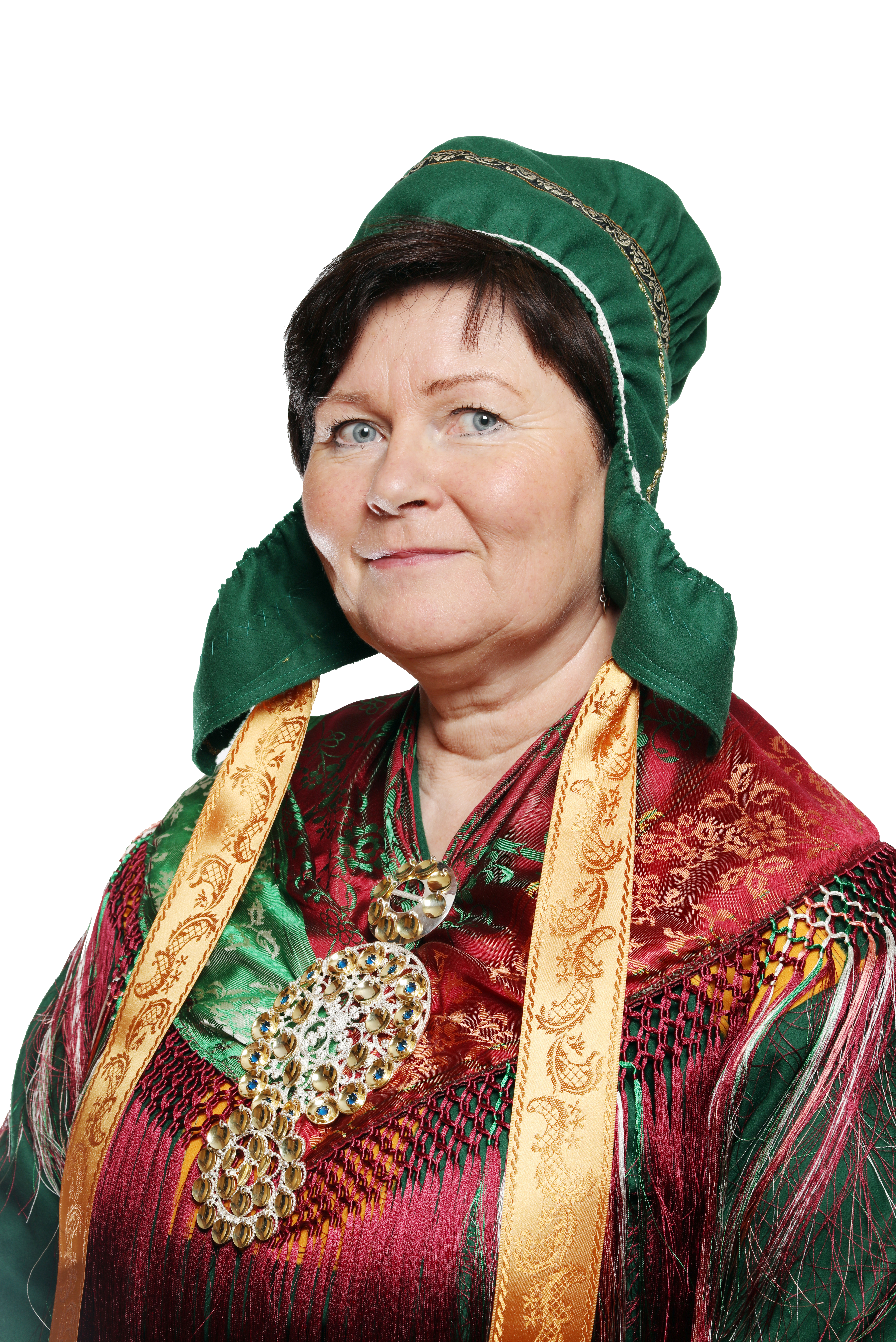 Elisabeth Erke sametingsrepresentant 2017